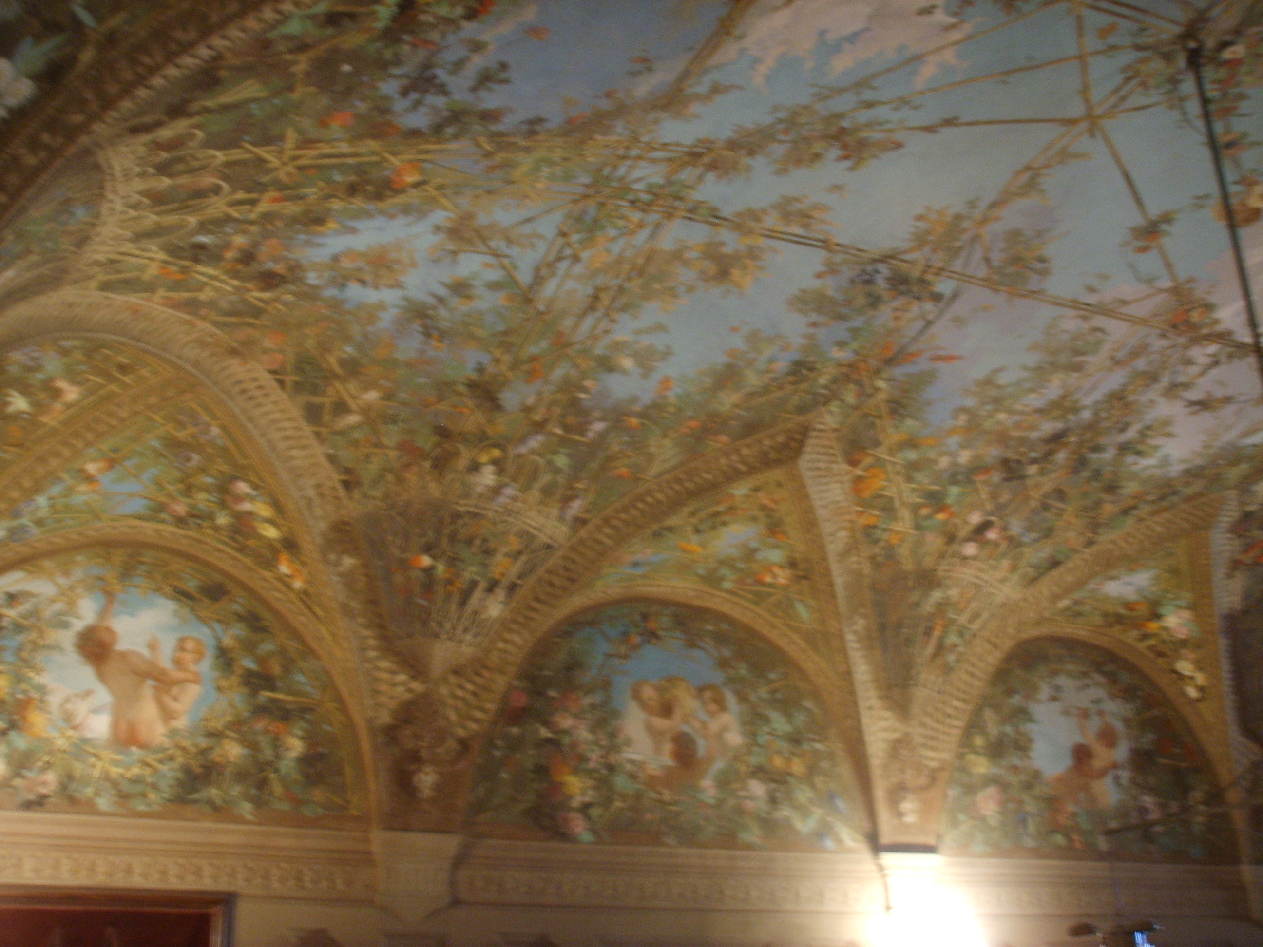 Villa medicea di Poggio a Caiano, inside sala dei biliardi in Poggio a Caiano, Italy